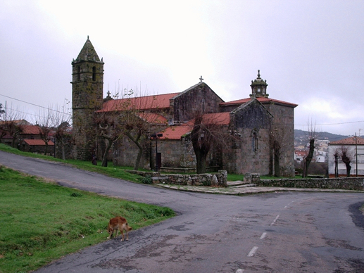 Imagen del exterior de la Iglesia Parroquial de Nosa Señora das Areas de Fisterra